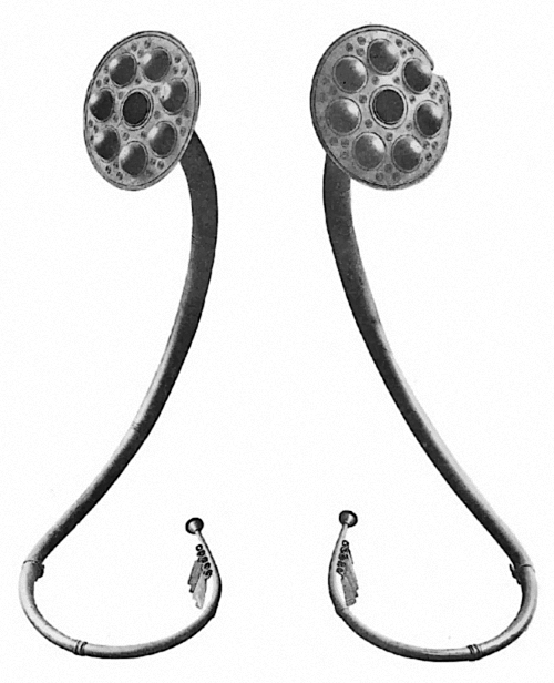 Bronselurer found in Brudevælte, Denmark, discovered in 1797.